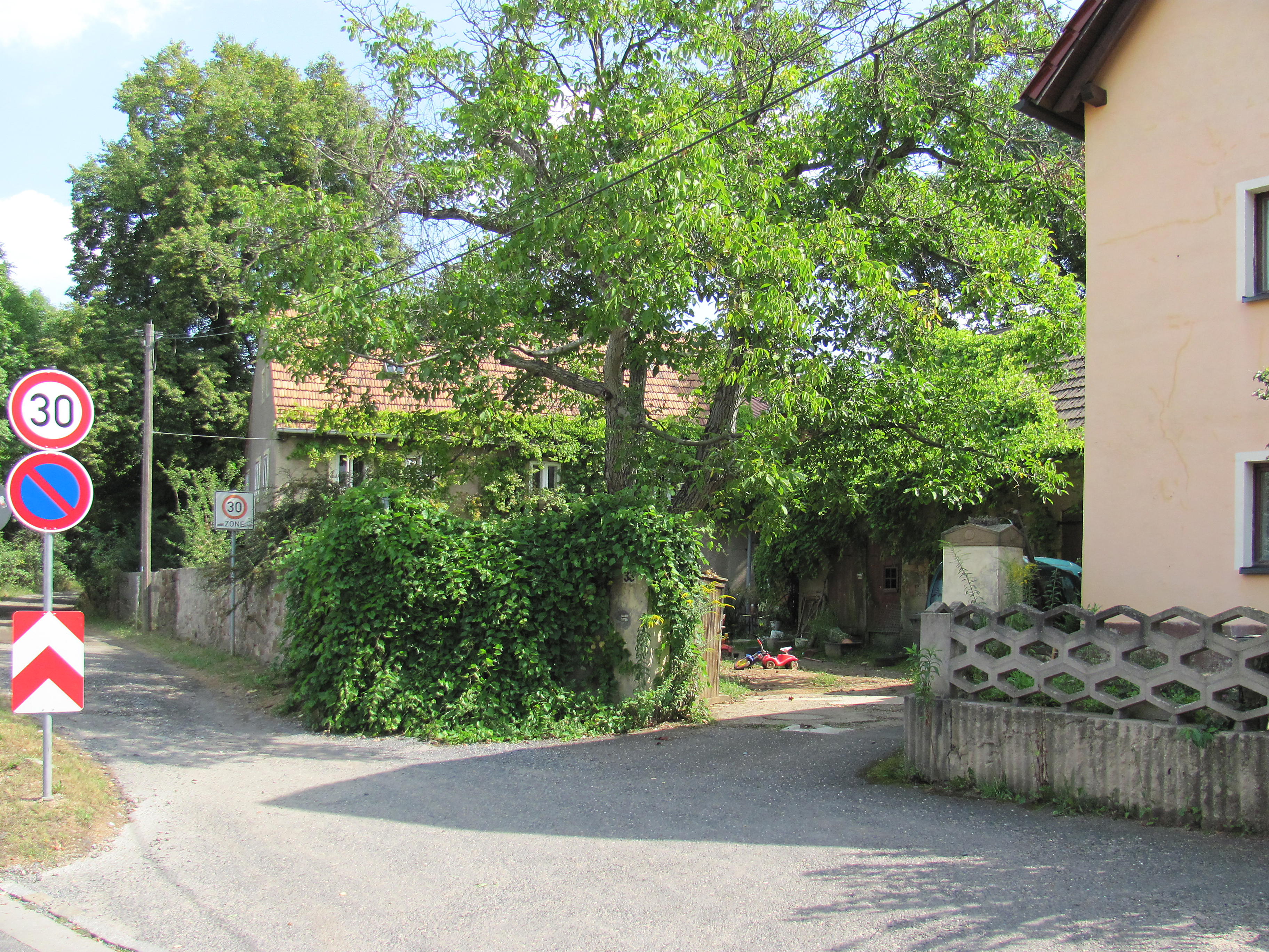 Lindenau, Altlindenau 33, links noch Altlindenau bis zur Nr. 35 oder schon Friedewaldweg?